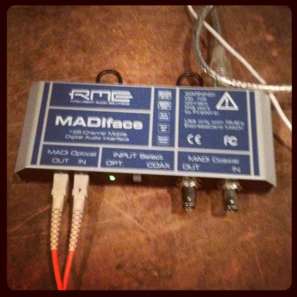 RME MADIface 128 channel mobile digital audio interface